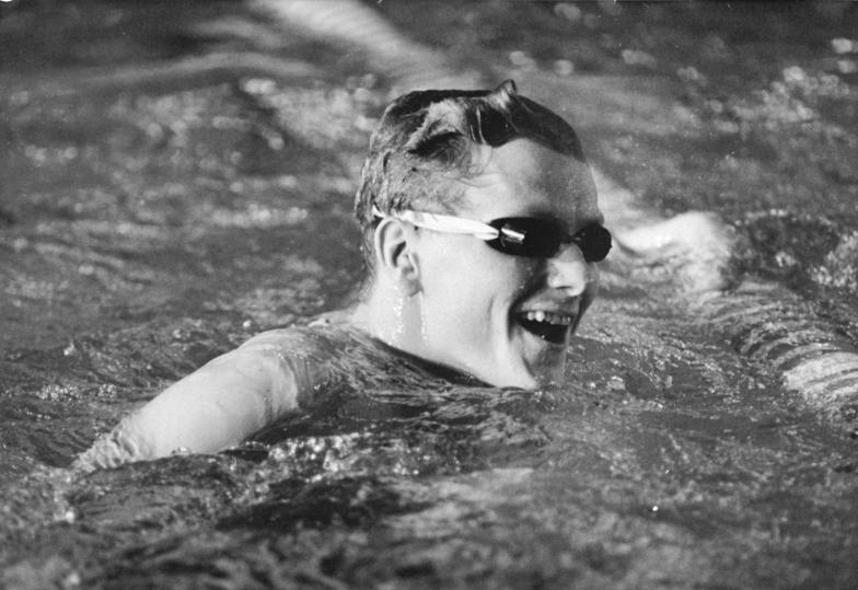 Raik Hannemann ADN-ZB Oberst 10.12.88 Berlin: 7. Sprintpokal im Sportschwimmen- Über 50 Meter Brust der Herren egalisierte Raik Hannemann (SC Dynamo) mit 28,99 sec den DDR-Rekord und verwies den Pokalgewinner der vergangenen zwei Jahre, Christian poswiat, um drei Hundertselsekunden auf den zweiten Platz.